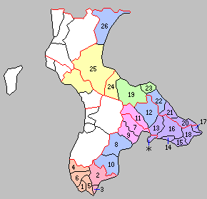 北海道函館支庁の町村。